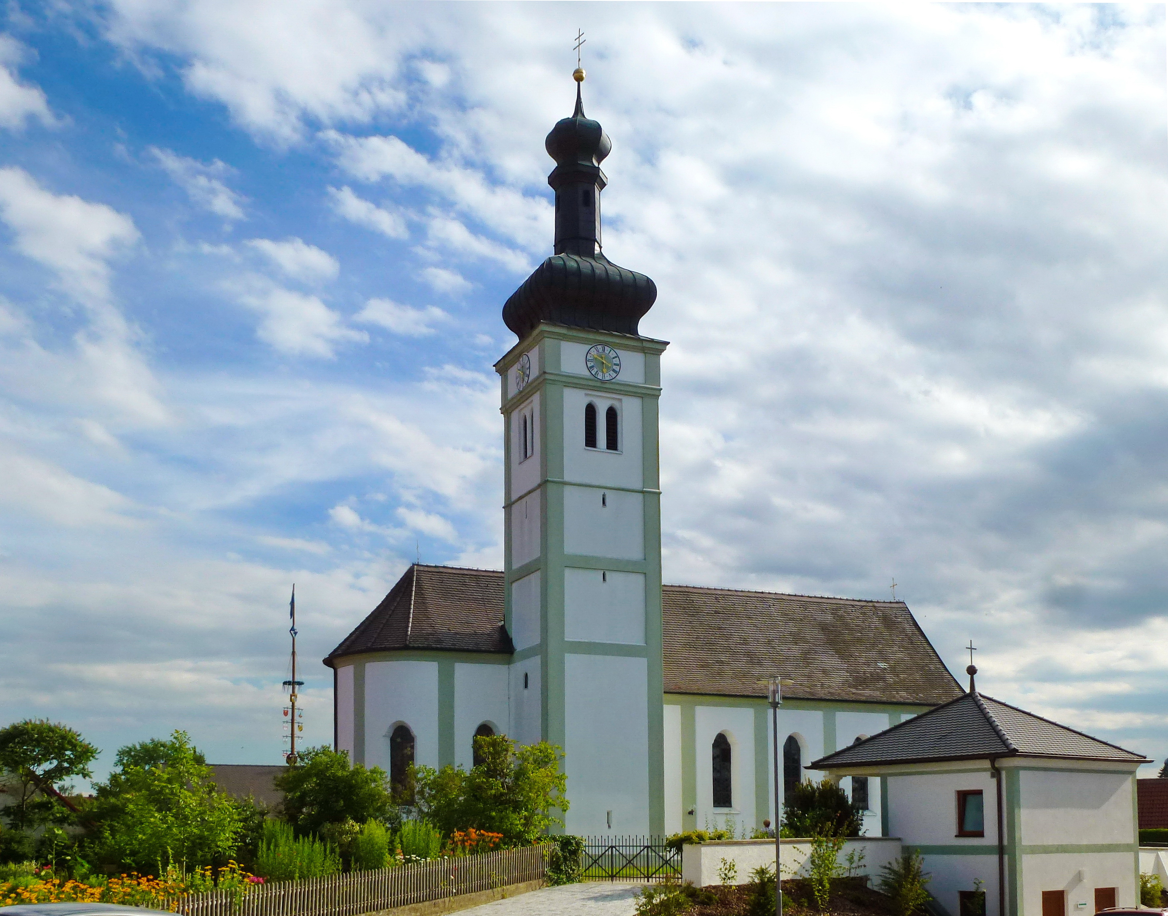 Pfaffenhofen an der Glonn, Kirchplatz 1: Katholische Pfarrkirche St. Michael, Ansicht von NNO